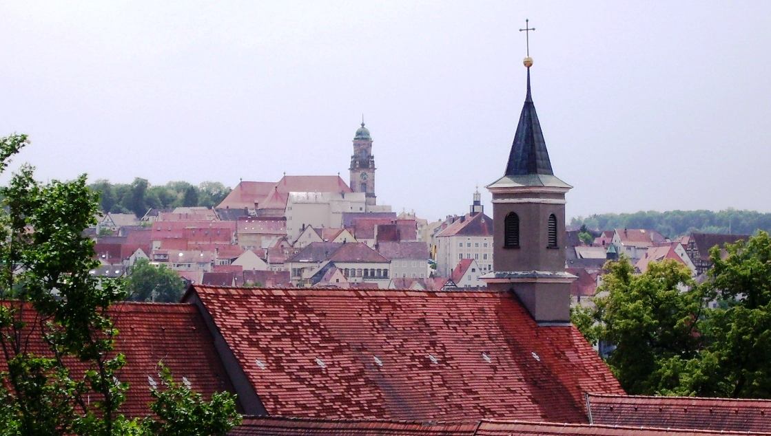 Hechingen, Germany